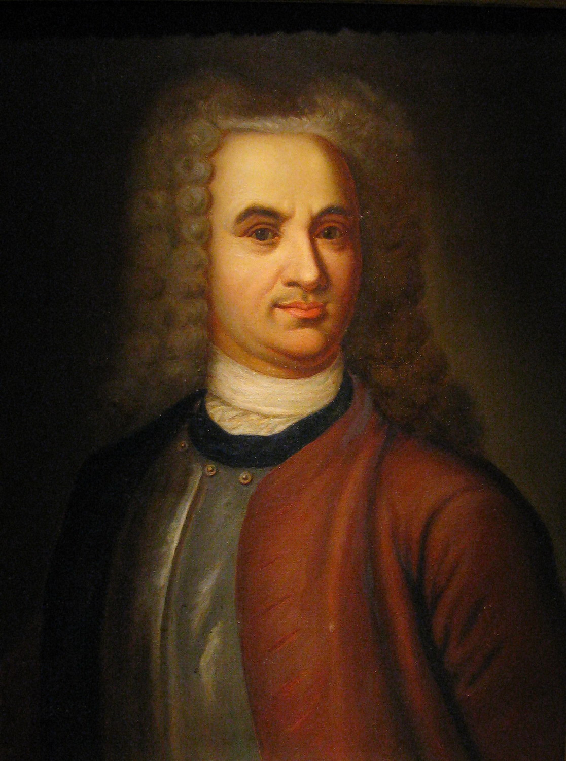 Портрет Василия Татищева